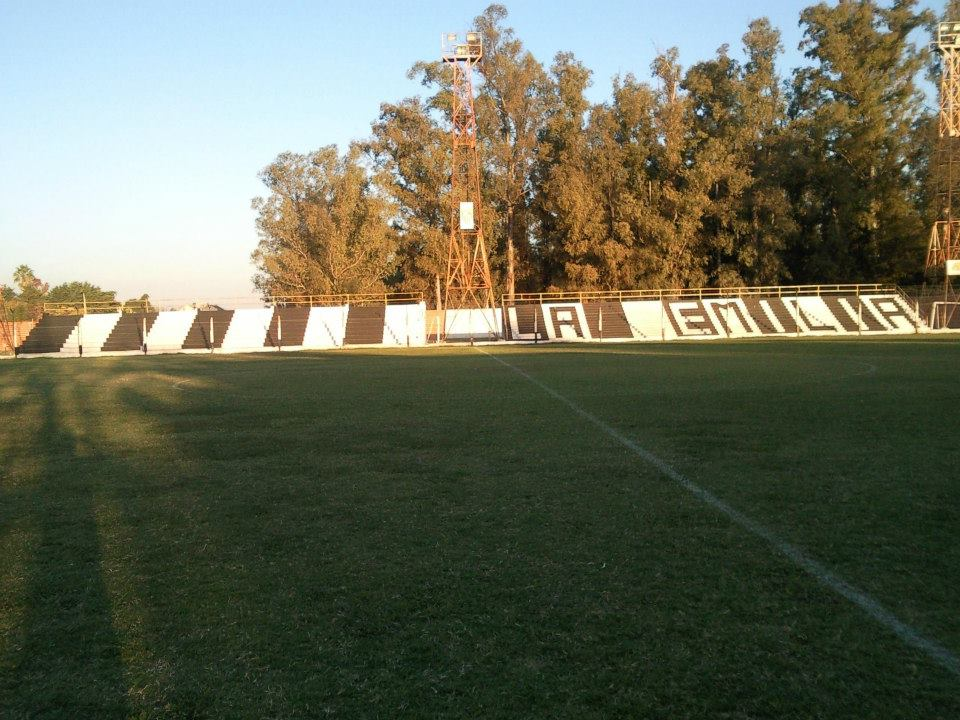 fsadf